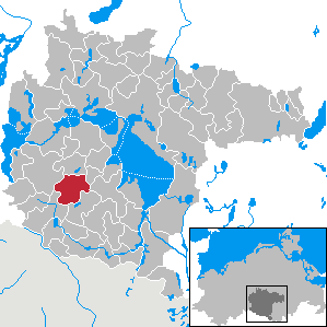 Leizen im Landkreis Müritz, Mecklenburg-Vorpommern